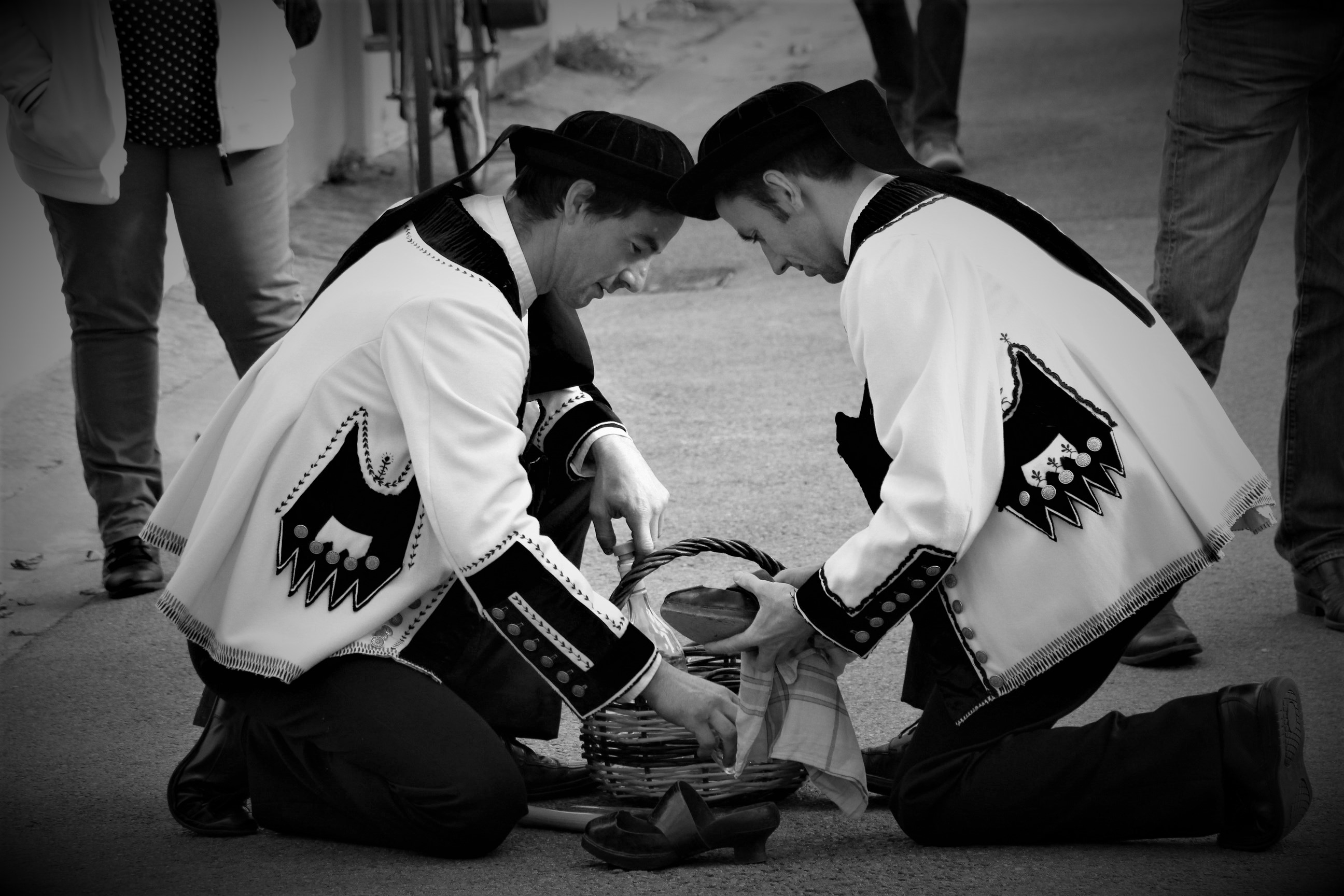 Costume homme